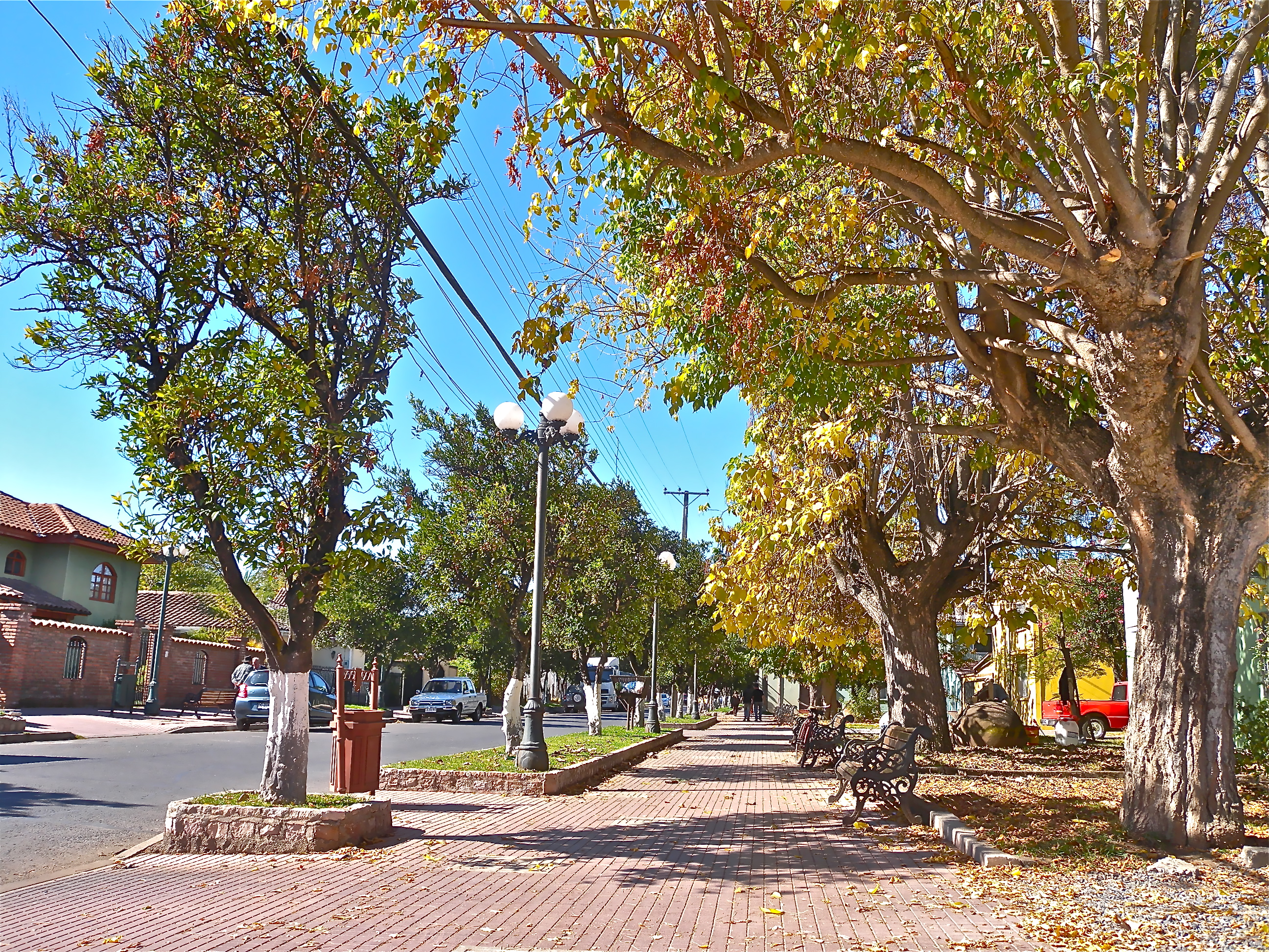 Calle típica de Villa Alegre